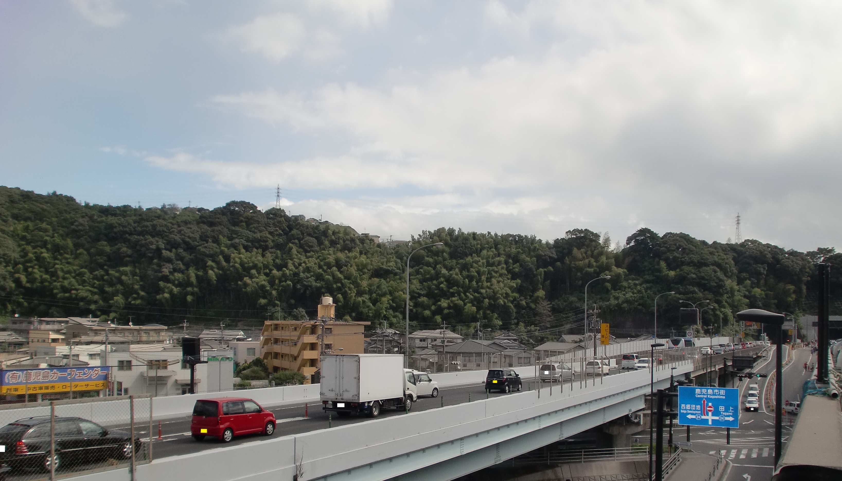 鹿児島インターチェンジ（工事中の鹿児島東西幹線道路高架上より、新武岡トンネルウォーキング時撮影）から武岡トンネルにかけて渋滞する車列と武岡トンネル